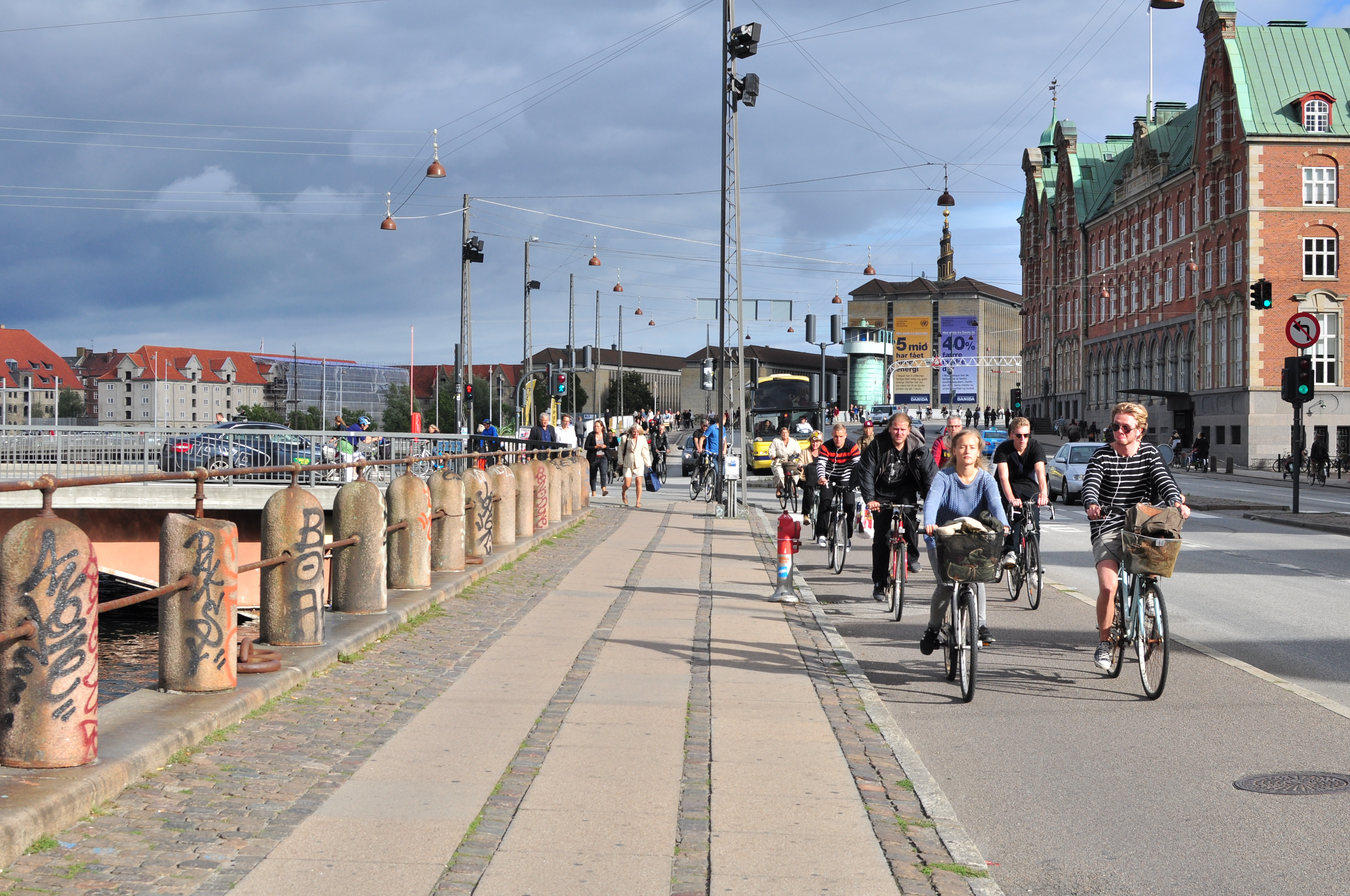 Børsgade in Copenhagen, Denmark